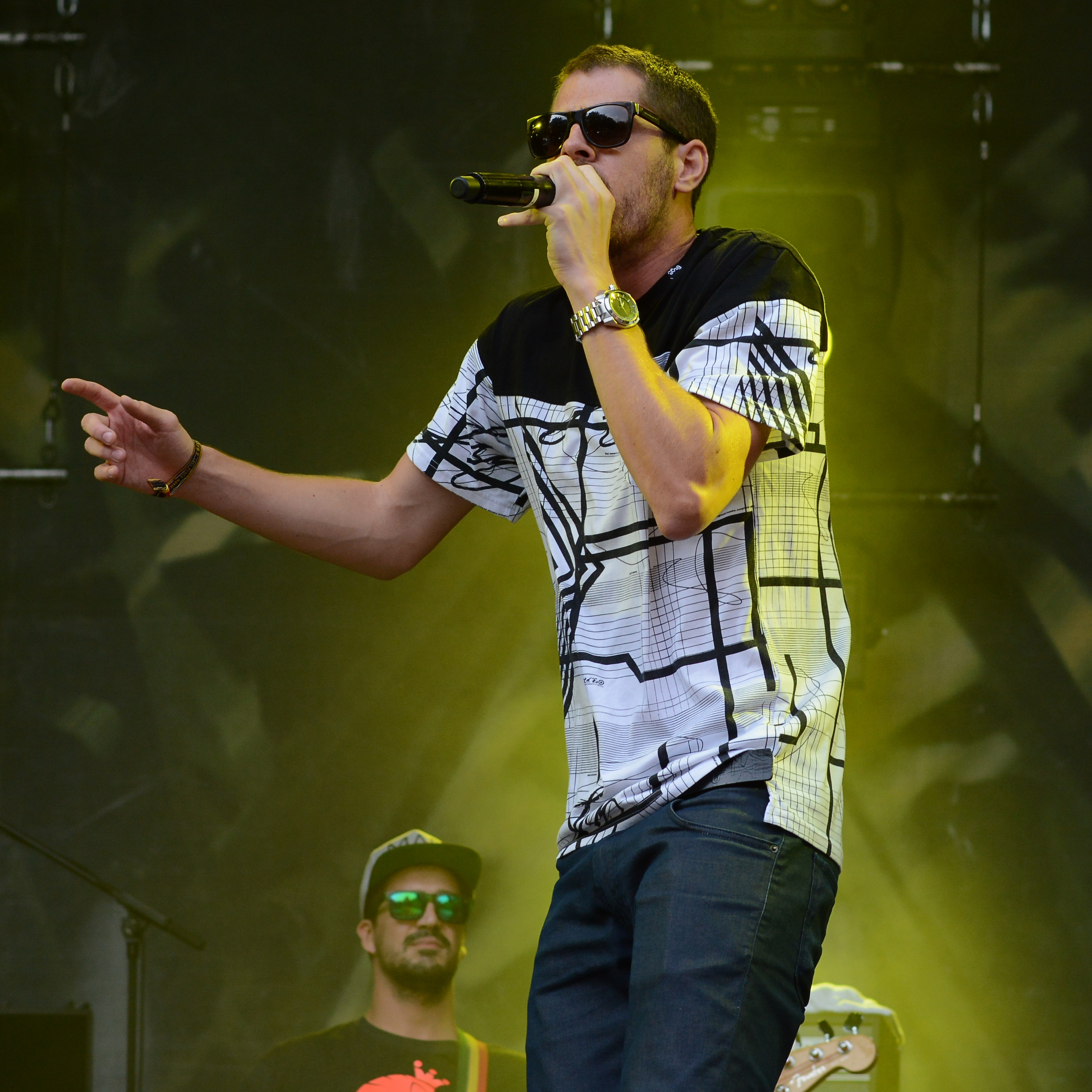 Richie Campbell / 911 Band beim Ruhr Reggae Summer in Mülheim